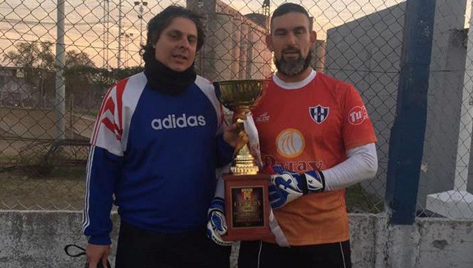 Con el trofeo del Apertura de la Liga Deportiva del Oeste.